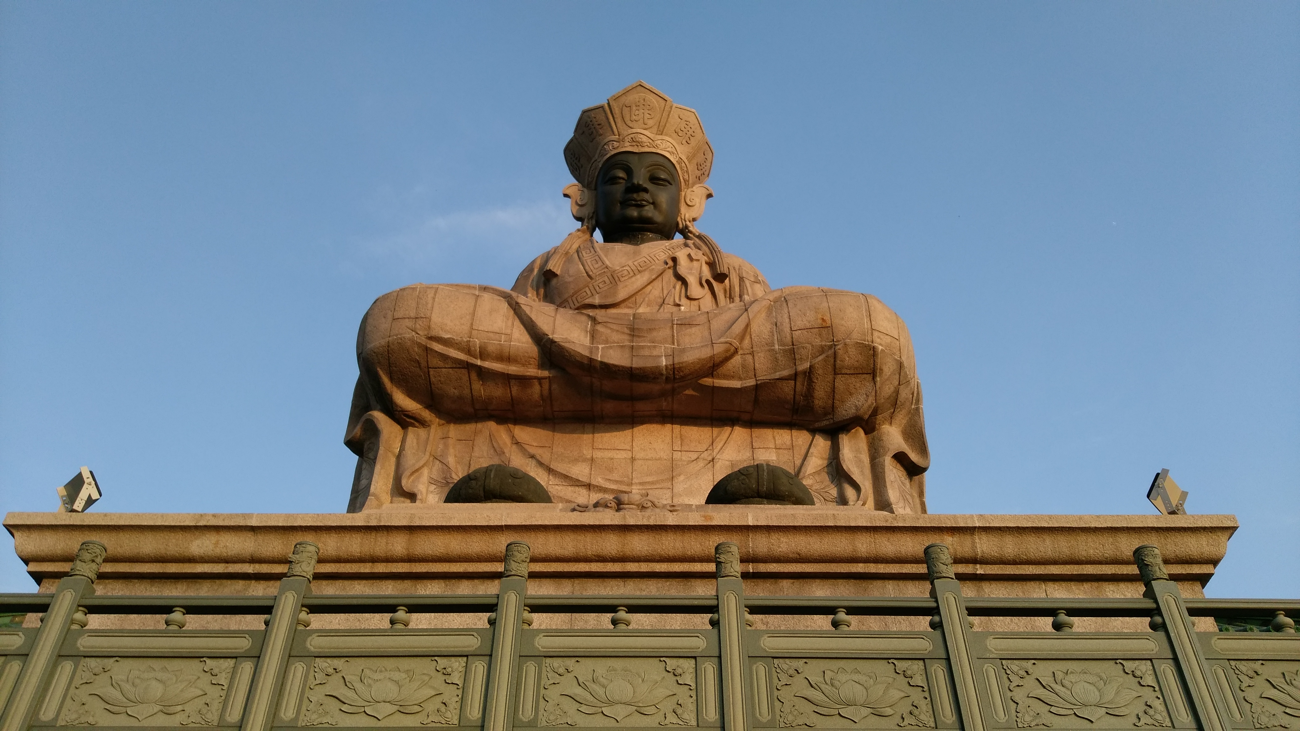 中文（台灣）: 左營洲仔清水宮清水祖師像